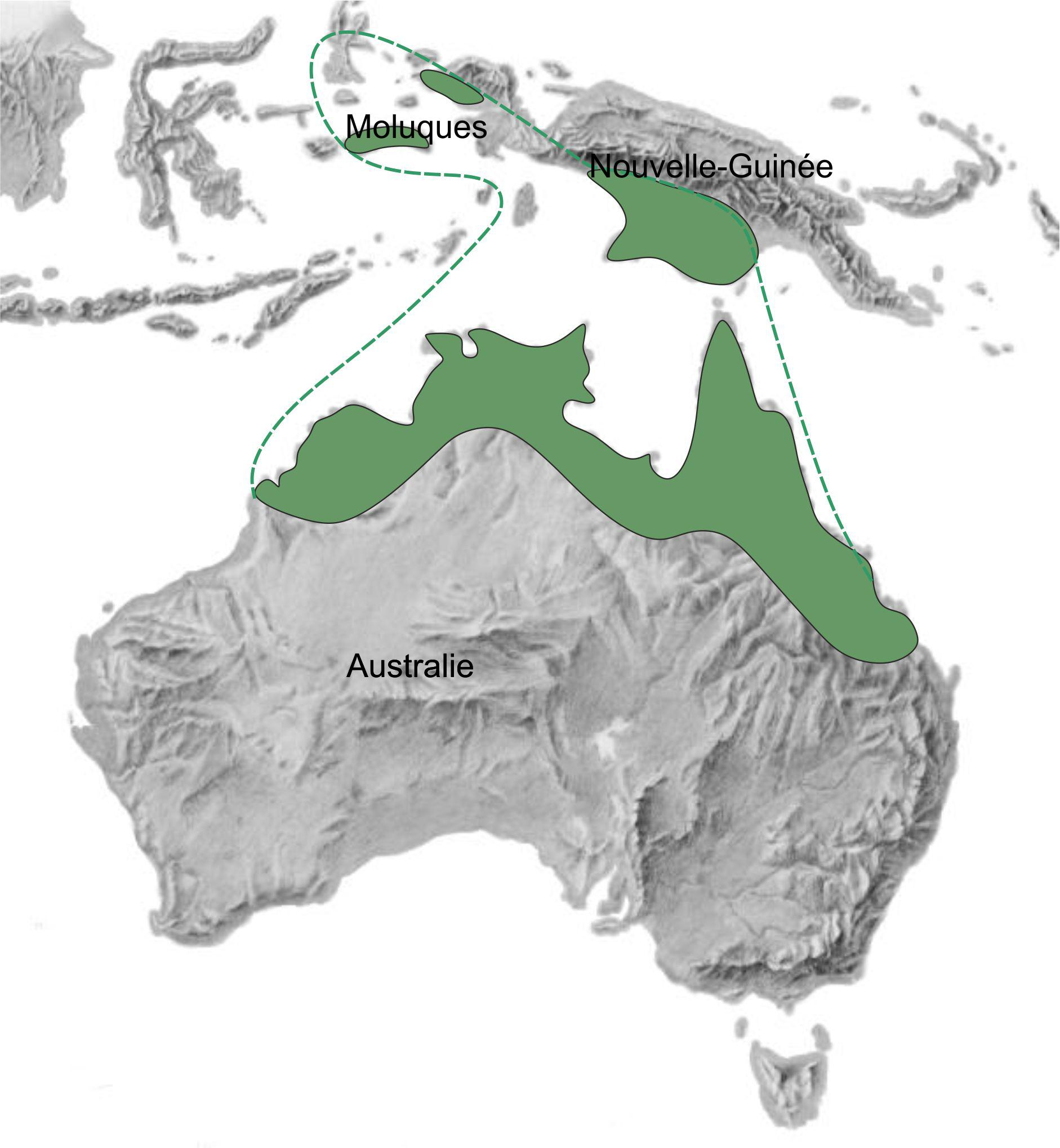 Distribbution de Melaleuca leucadendra (fond domaine public Kenneth Townsend) d'après Craven, 2003